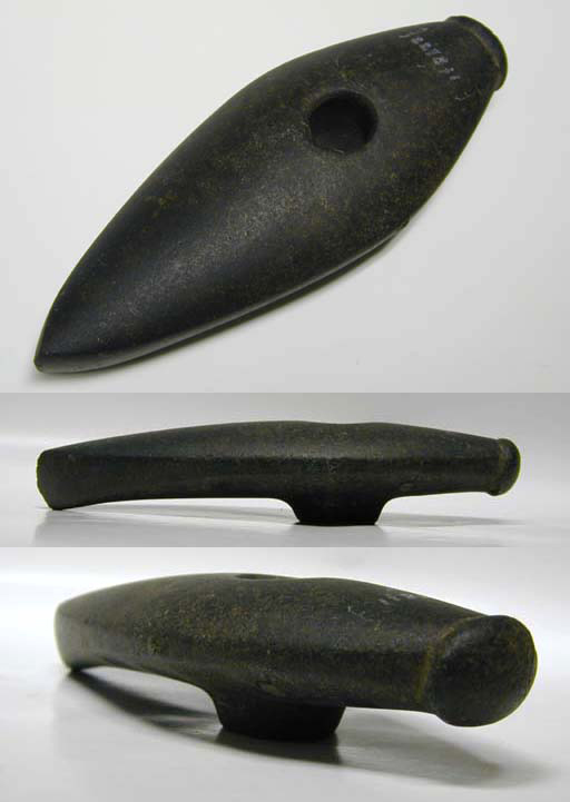 Stridsyxa tillhörande den svensk-norska stridsyxekulturen, med fyndort i södra Sverige. Yxan kommer från Kullagården i Hångsdala socken, Vartofta härad, Tidaholms kommun, f.d. Skaraborgs län, Västergötland, Västra Götalands län, Sverige. Yxan inköptes 1959 till Falbygdens museum i Falköping och har där inventarienumret 2M16-2278:1.